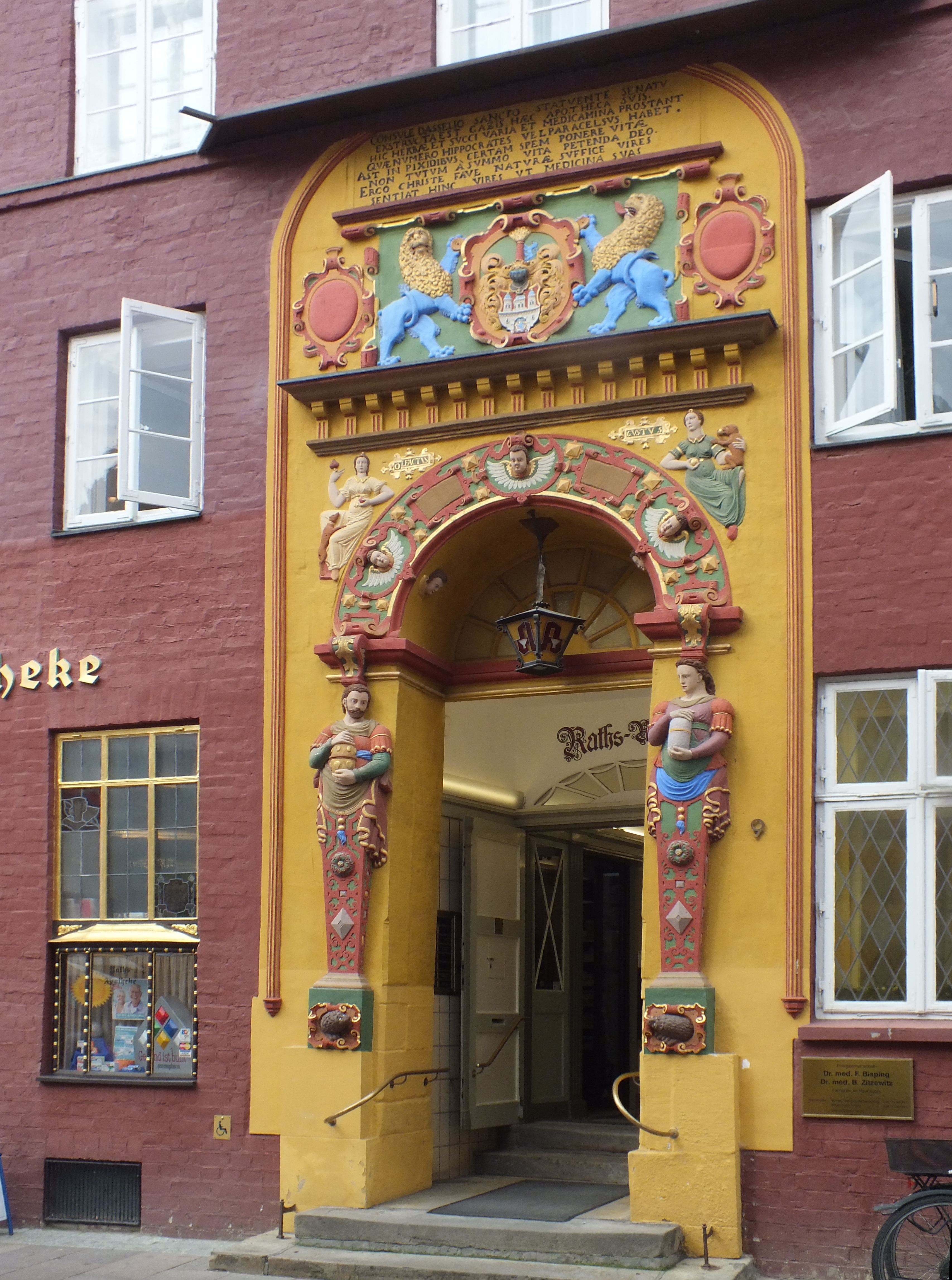 Lüneburg, Alte Raths-Apotheke